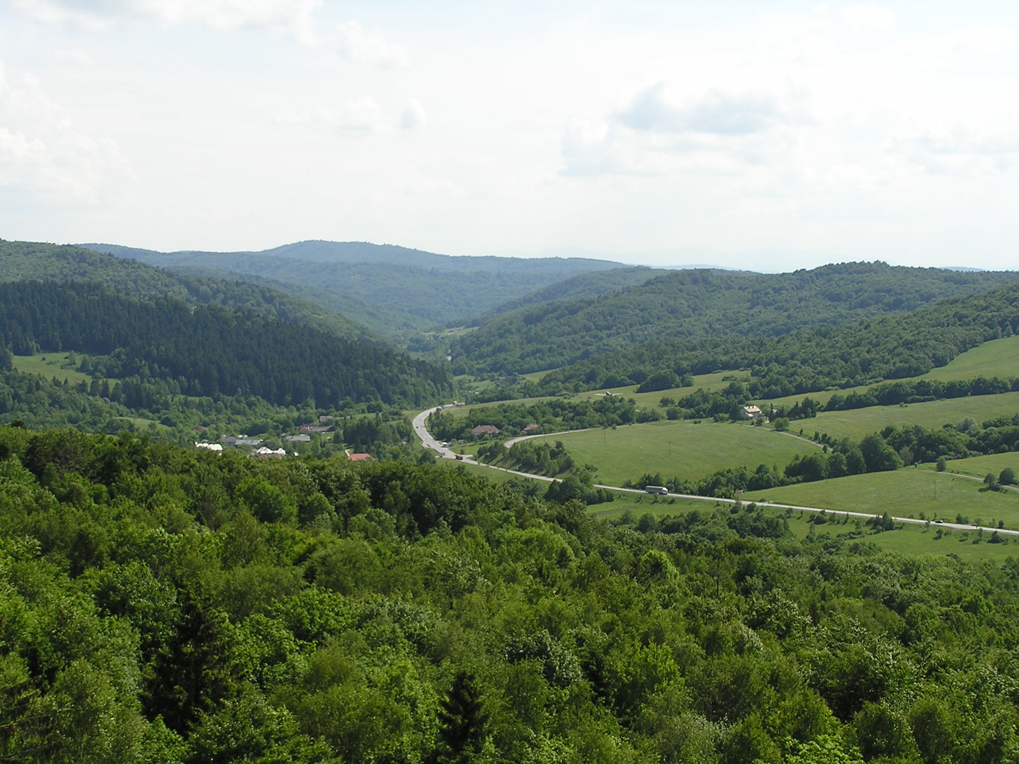 Dedina Vyšný Komárnik v priebehu 30 rokov bola dvakrát zničená. Po prvýkrát v októbri 1914 pri prvej svetovej vojne a po druhýkrát v októbri 1944. Dve generácie obyvateľov prišli o svoj majetok. Zostal im len holý život a predsavzatie začínať odznovu.